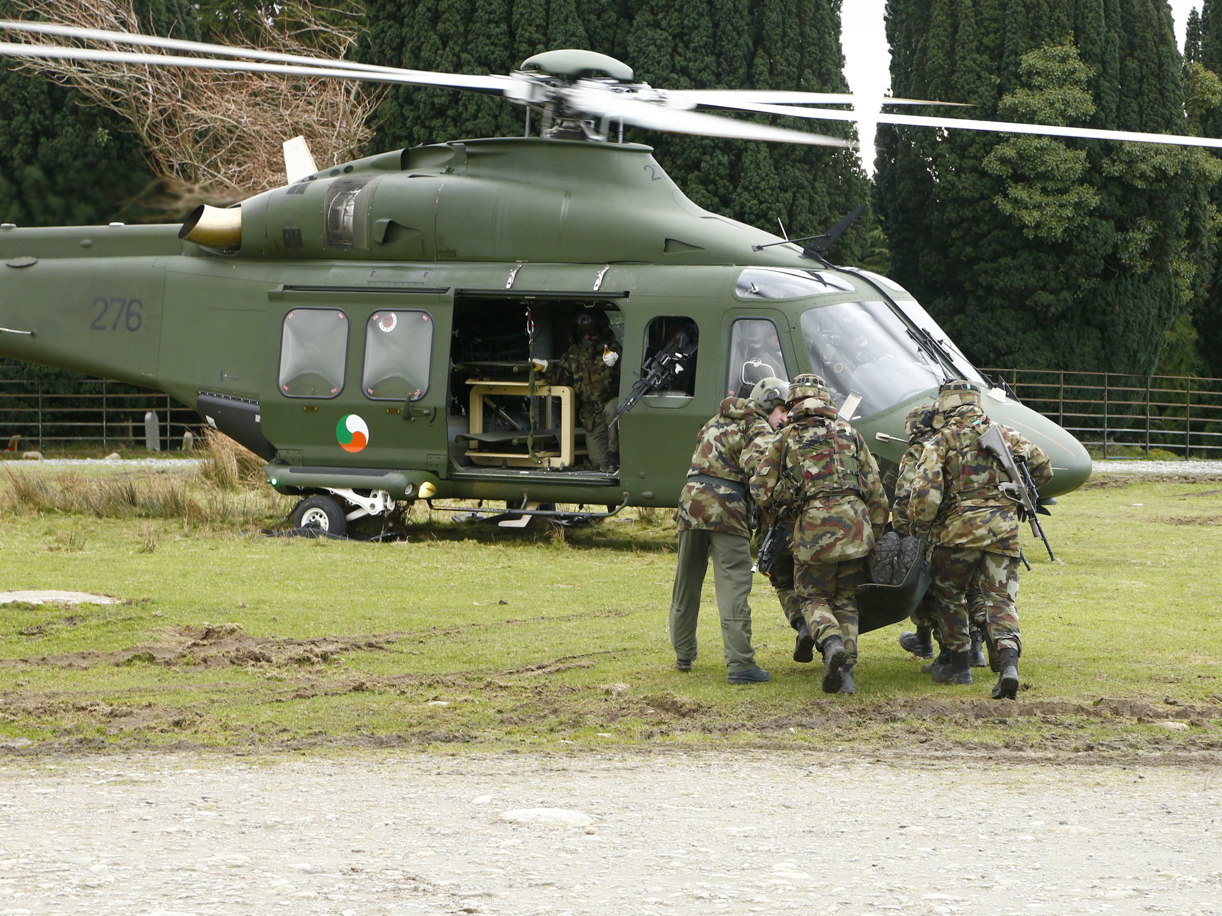 MRE 10